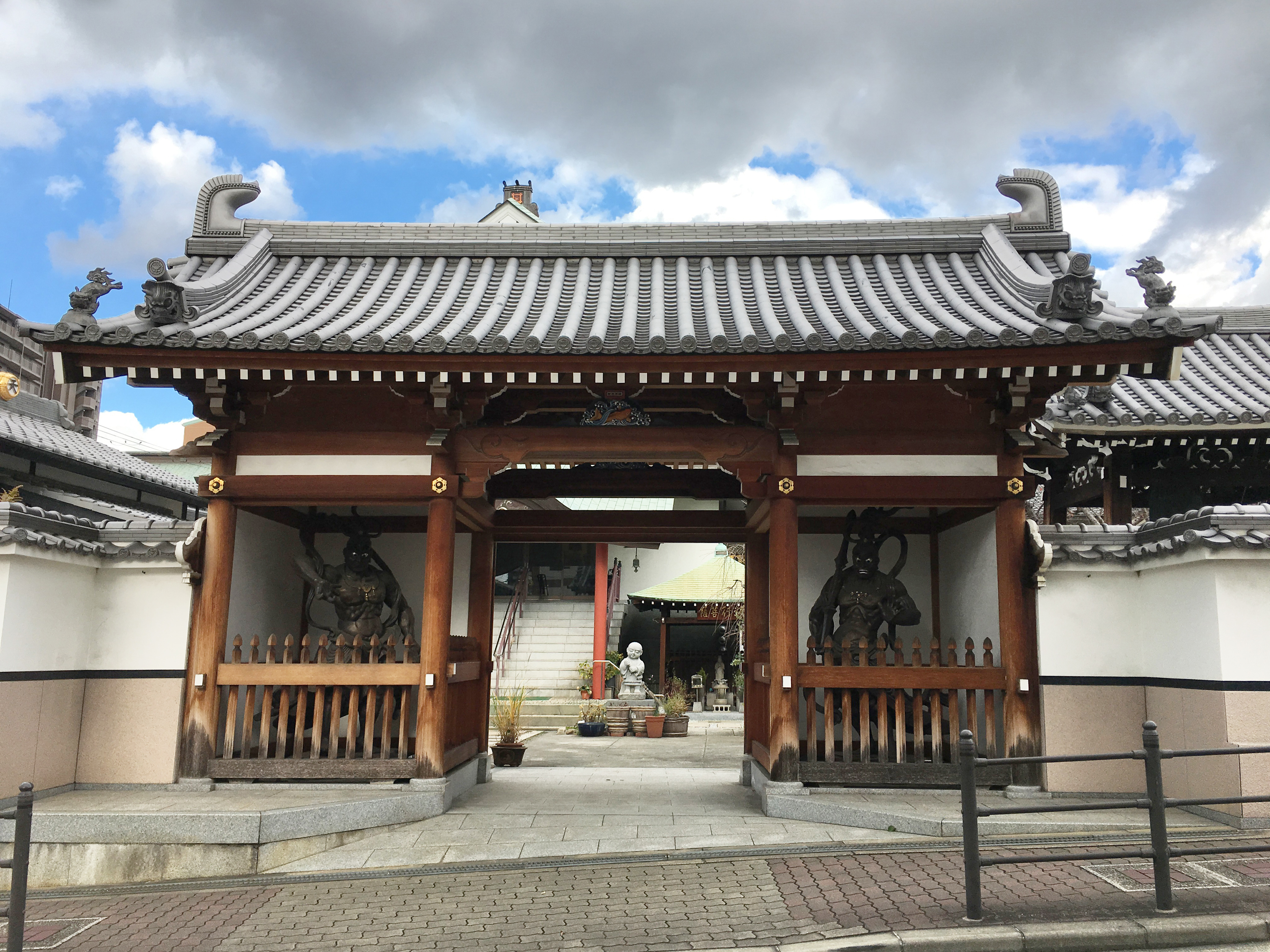 法性寺 山門（南門）